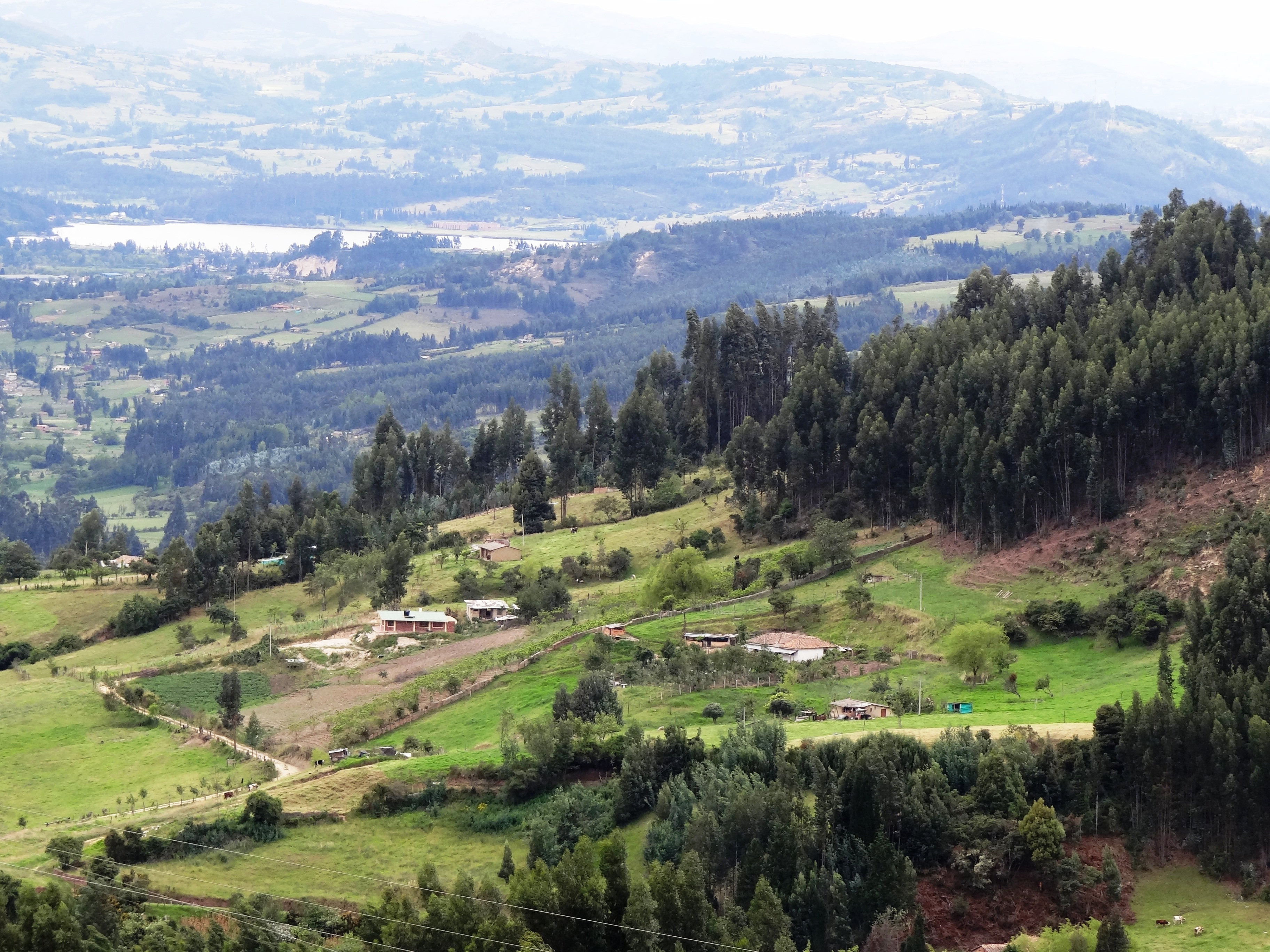 Paraje rural en la vereda Santa Ana en el municipio de Duitama, departamento de Boyacá, Colombia.